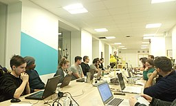 Група студента учи кодирање на фриКодКамп платформи